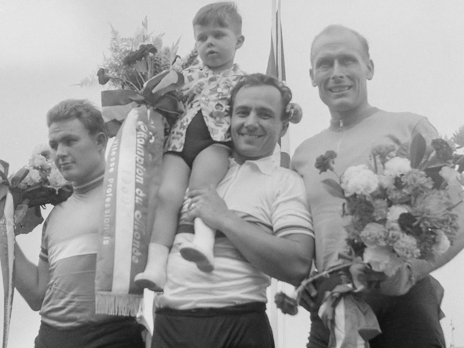 Wereldkampioenschap wielrennen op de baan in het Olympisch stadion te Amsterdam, v.l.n.r. Rousseau(2e), Maspes(1e) en Derksen(3e) 9 augustus 1959